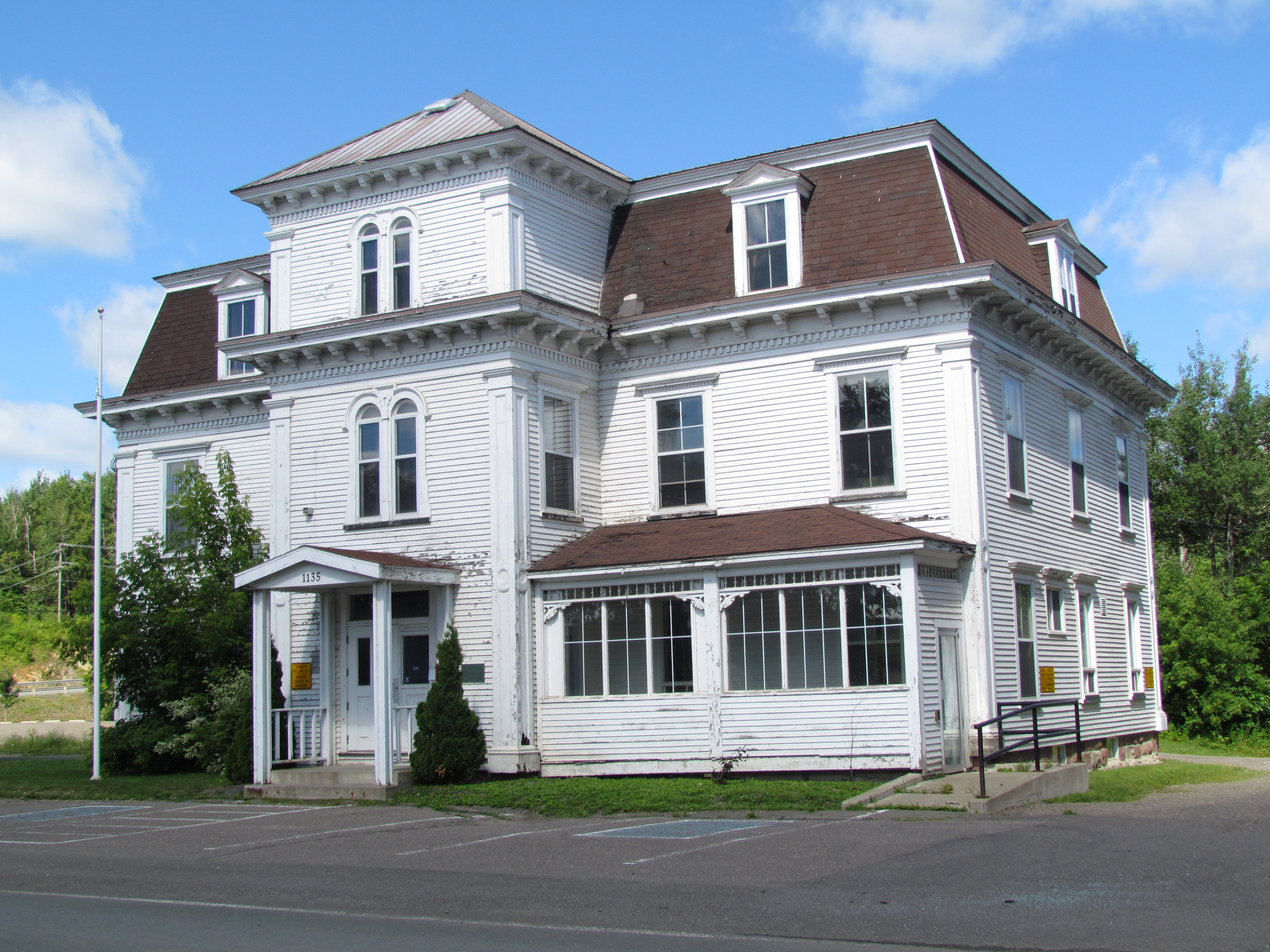 Palais de justice du comté de Victoria, 1135, promenade West Riverside, Perth-Andover (Canada). (Protection LPP. Voir la liste des lieux patrimoniaux du comté de Victoria (Nouveau-Brunswick) pour plus de détails).